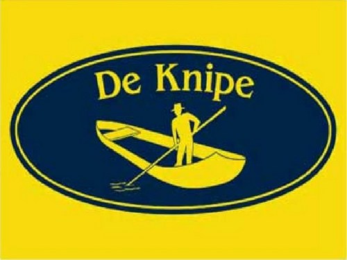 dit is de knypstervlag, de praam of wel de knypsterbok, staan symbool voor de knipe